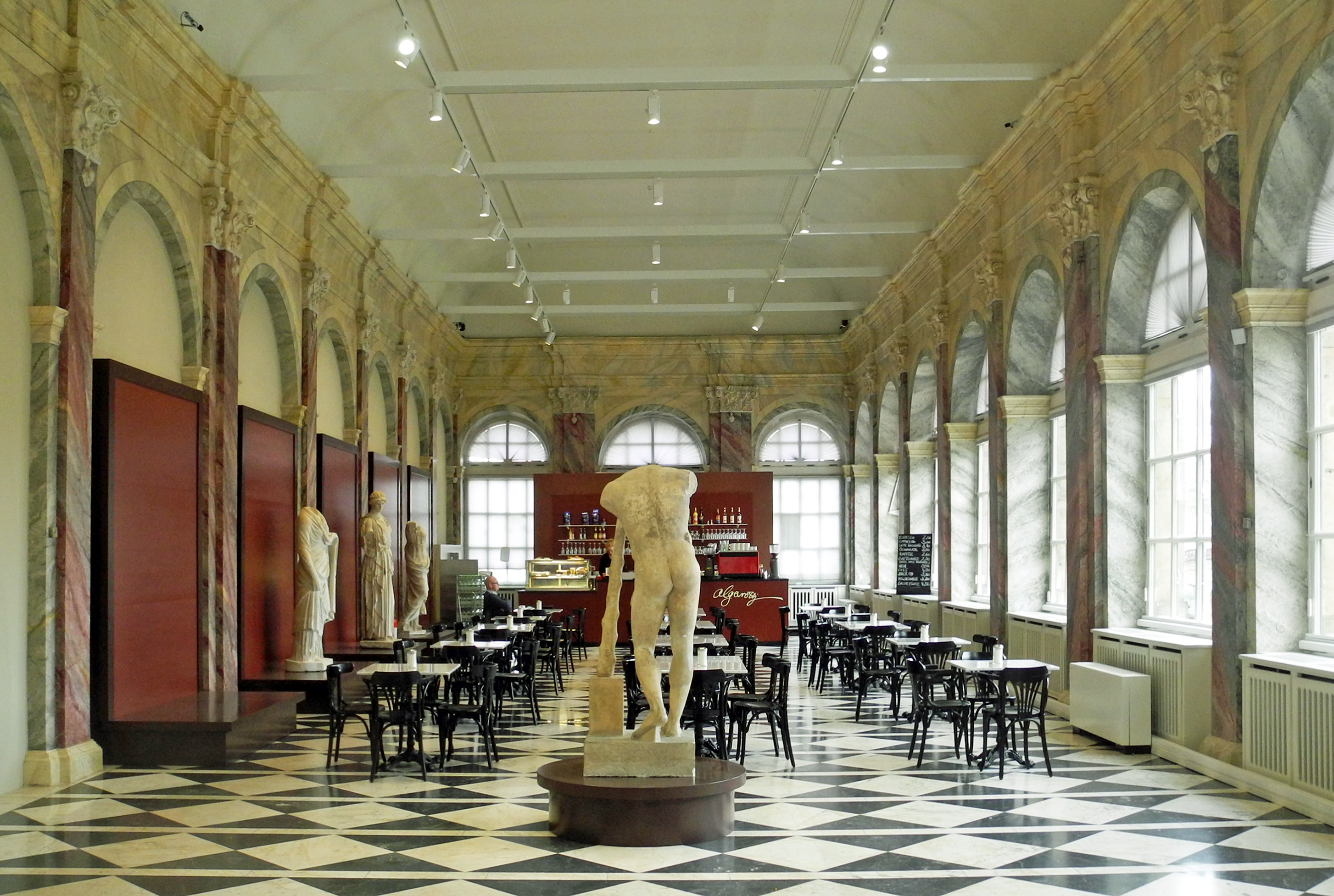 Festwoche zur Wiedereröffnung des Semperbaus mit der Gemäldegalerie Alte Meister und der Skulpturensammlung bis 1800 vom 28. Februar bis 8. März 2020 in Dresden – Deutscher Saal – Café Algarotti, benannt nach dem italienischen Kunsthändler Francesco Graf von Algarotti (1712–1764)